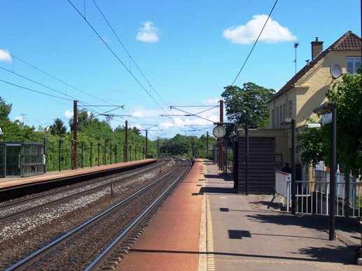 Viby Sjælland Station